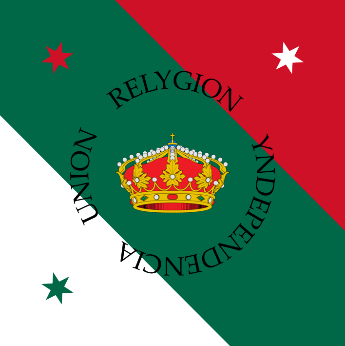 Bandera del Ejército de las Tres Garantías.